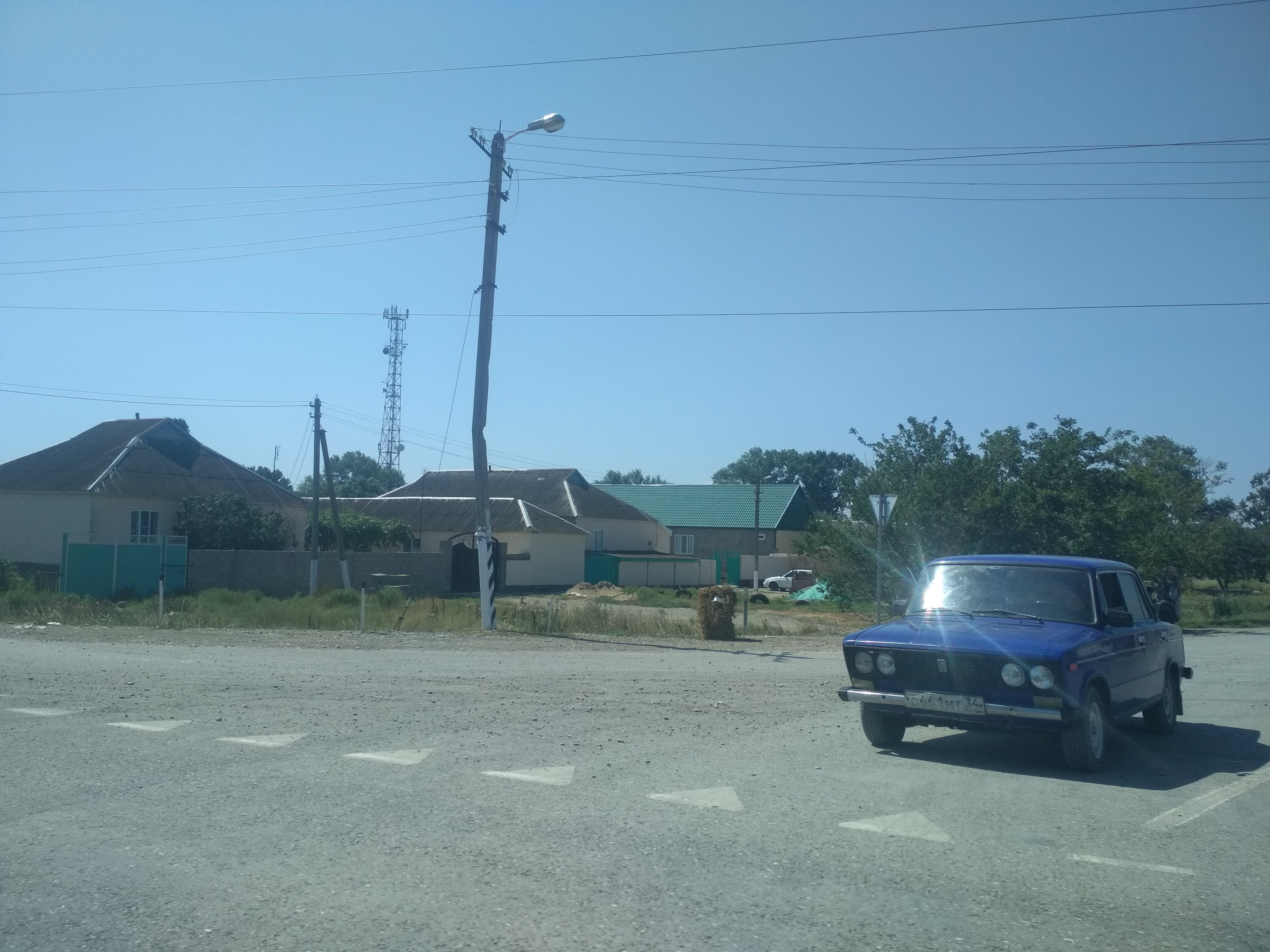 Нохчийн: Львовский №1